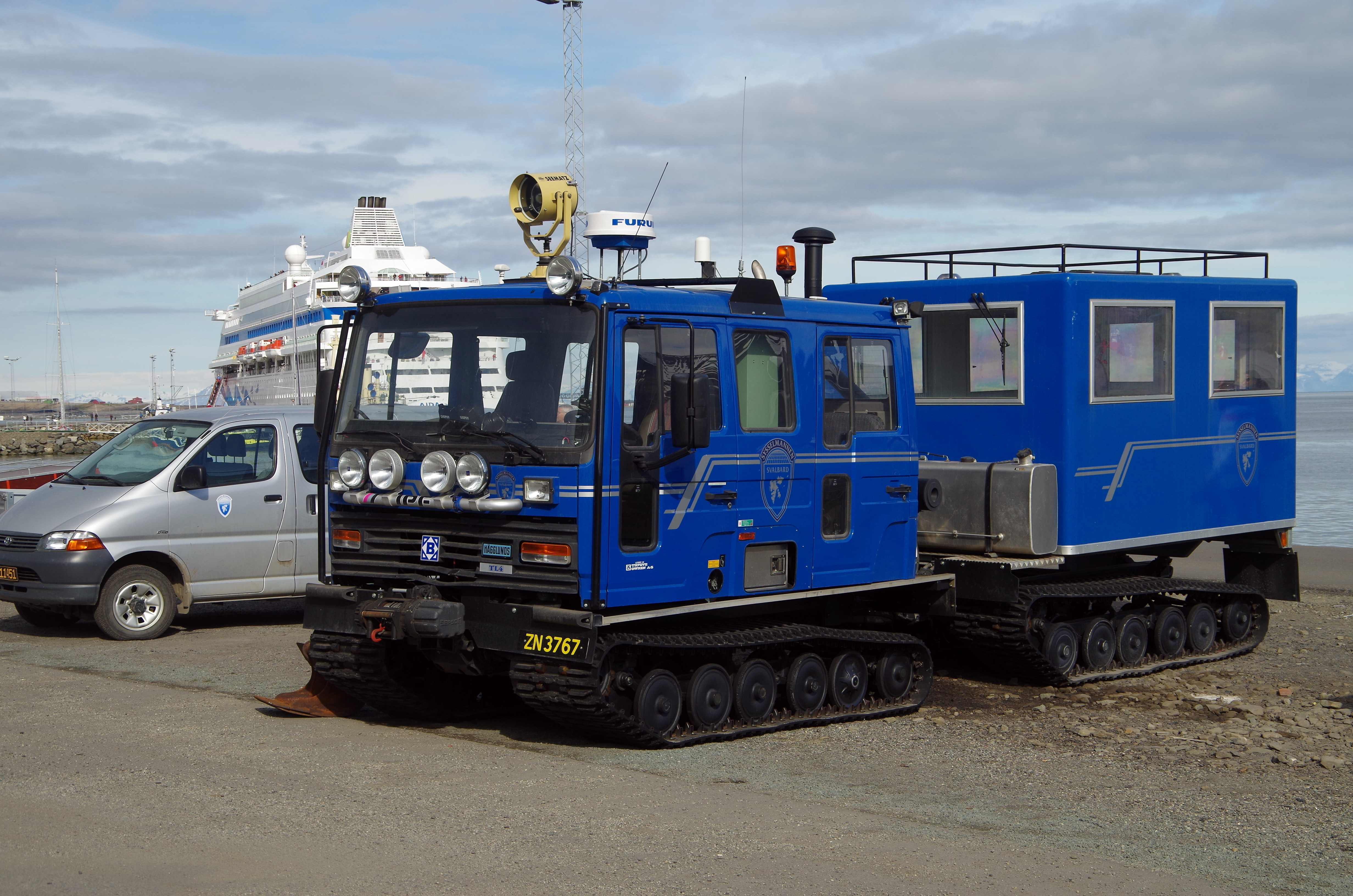 Schneefahrzeuge auf Spitzbergen